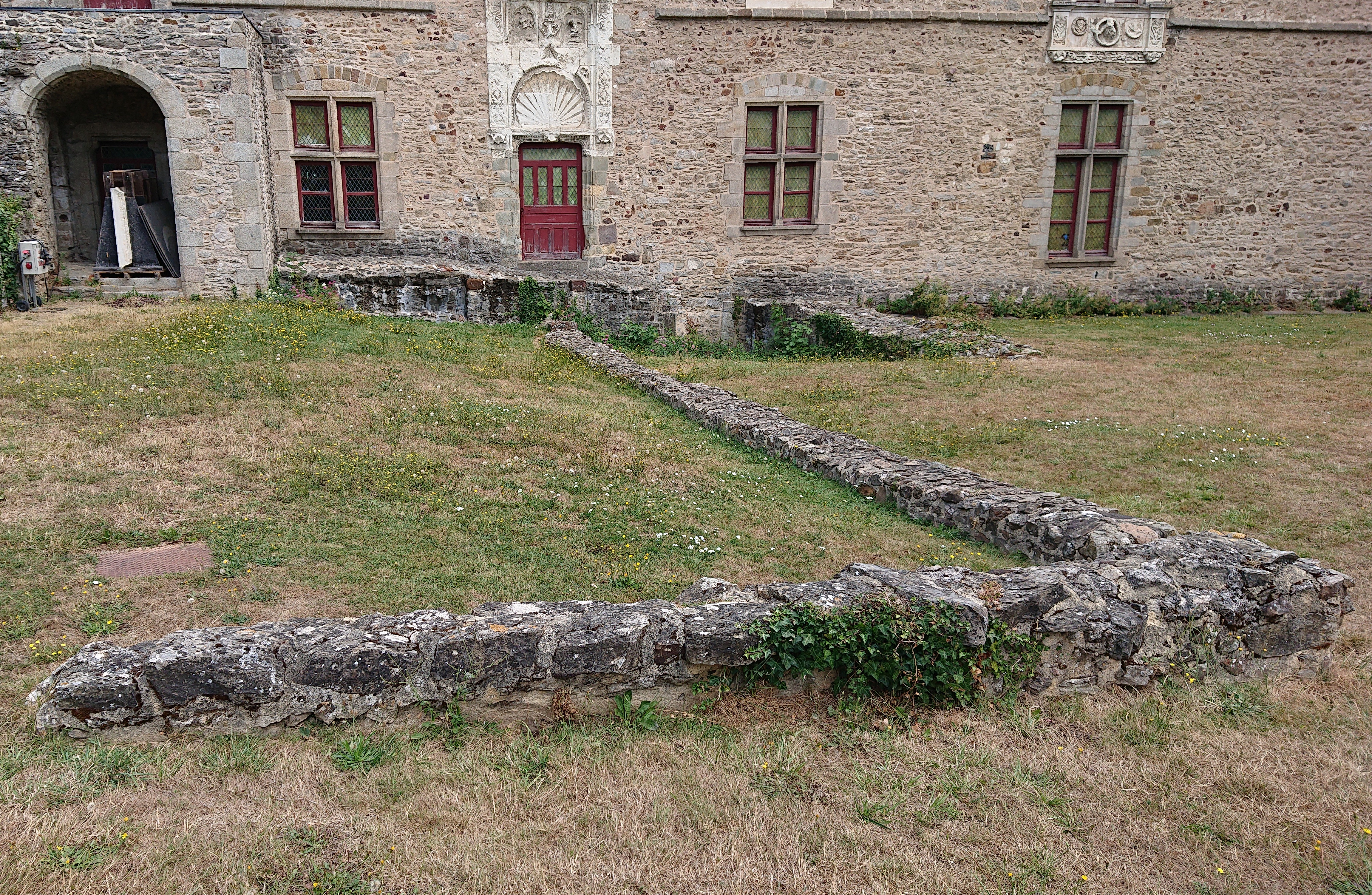 Vestiges du premier logis seigneurial construit dans le château de Laval.